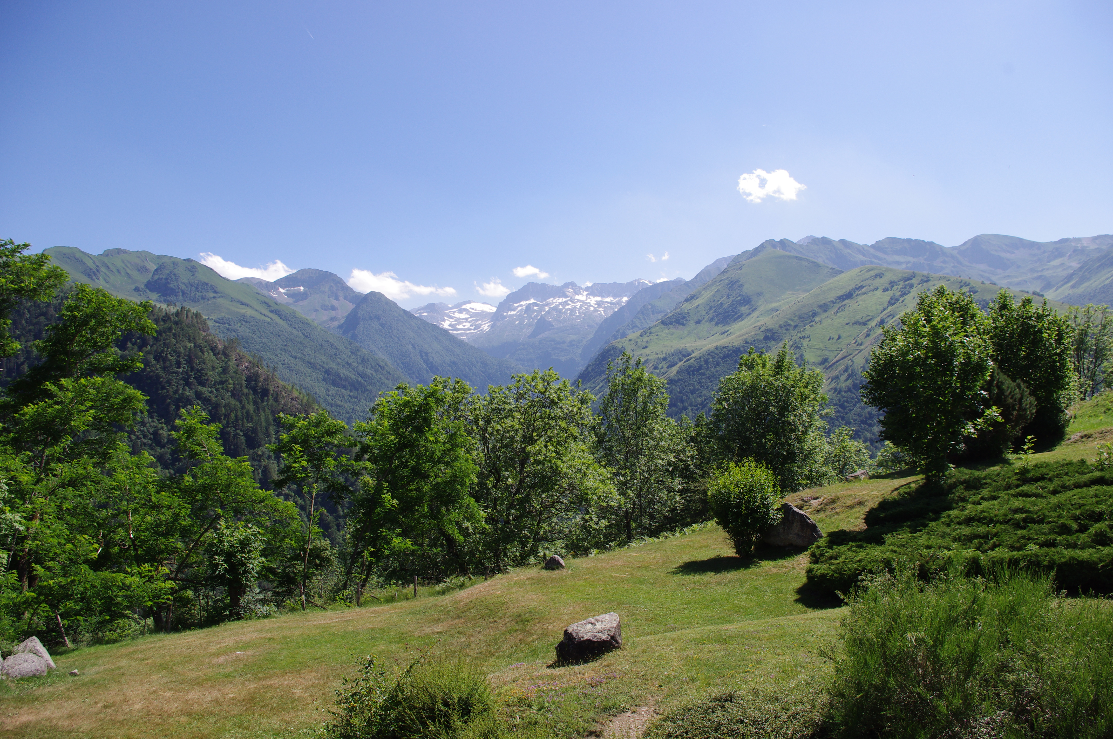 Pireneje, Garin (Haute-Garonne), Francja.